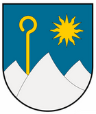 Wappen von Guttet-Feschel, Kanton Wallis, Schweiz